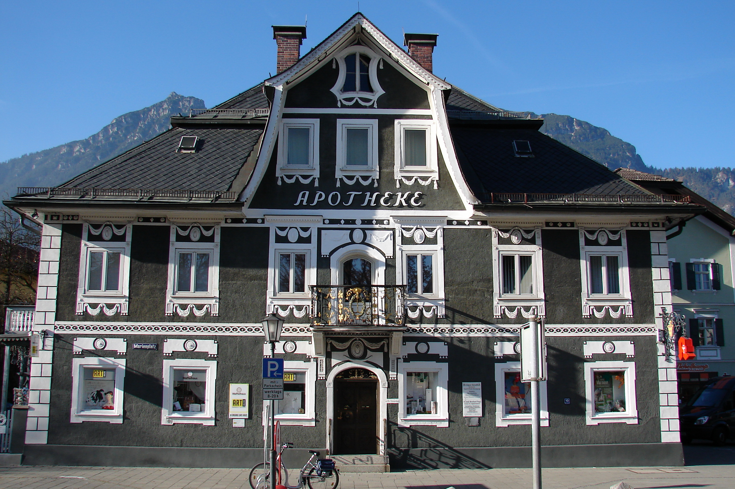 Die Alte Apotheke ist ein stattliches, im Empire-Stil italienischer Prägung erstelltes Gebäude. Das Patrizierhaus besitzt ein gebrochenes Walmdach, große Zwerchgiebel und Empiredekor.